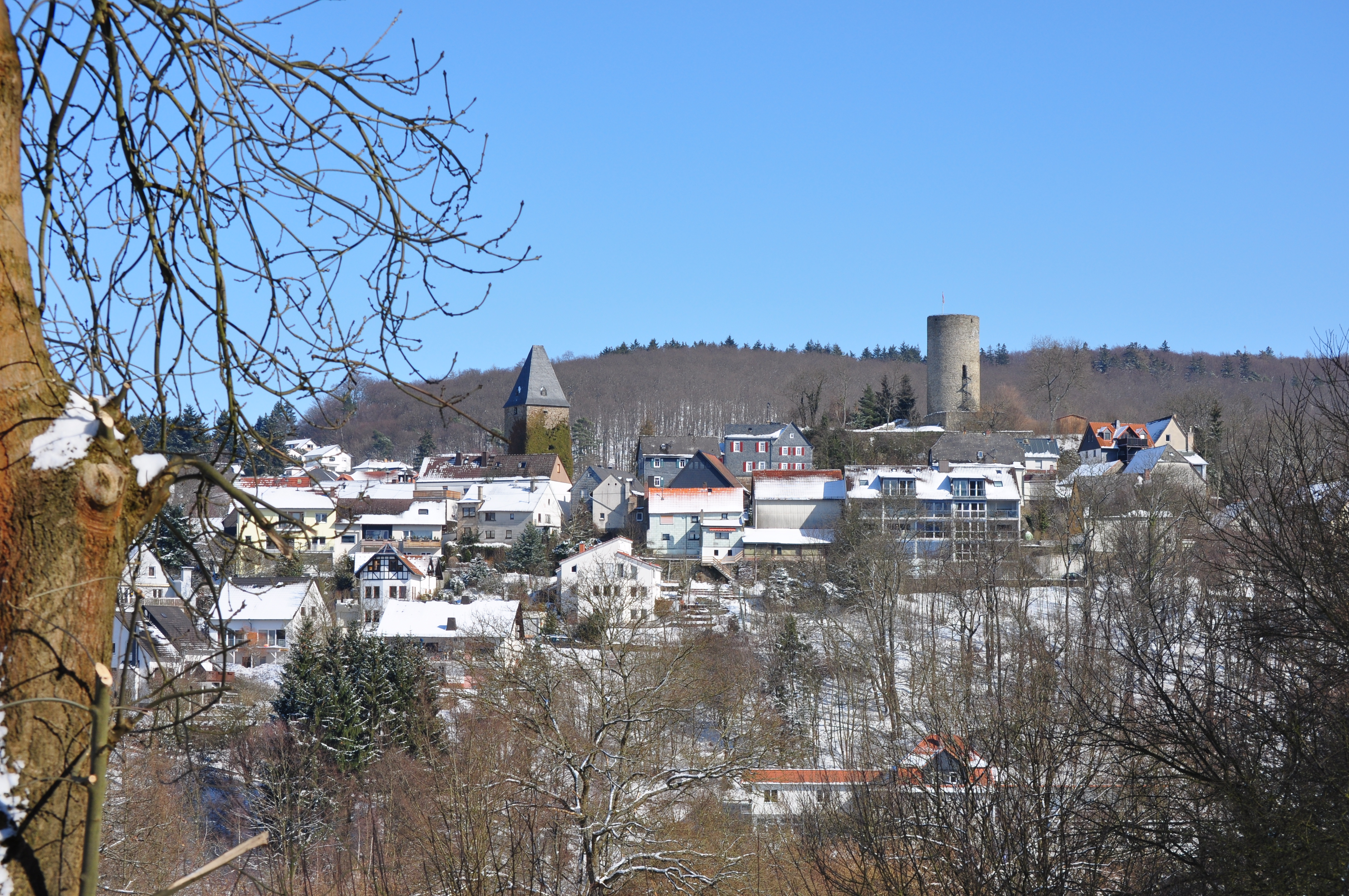 Altweilnau, Gesamtansicht